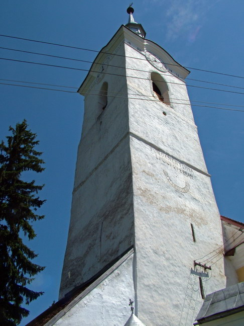 Gyergyószárhegy - Római katolikus erődtemplom - torony